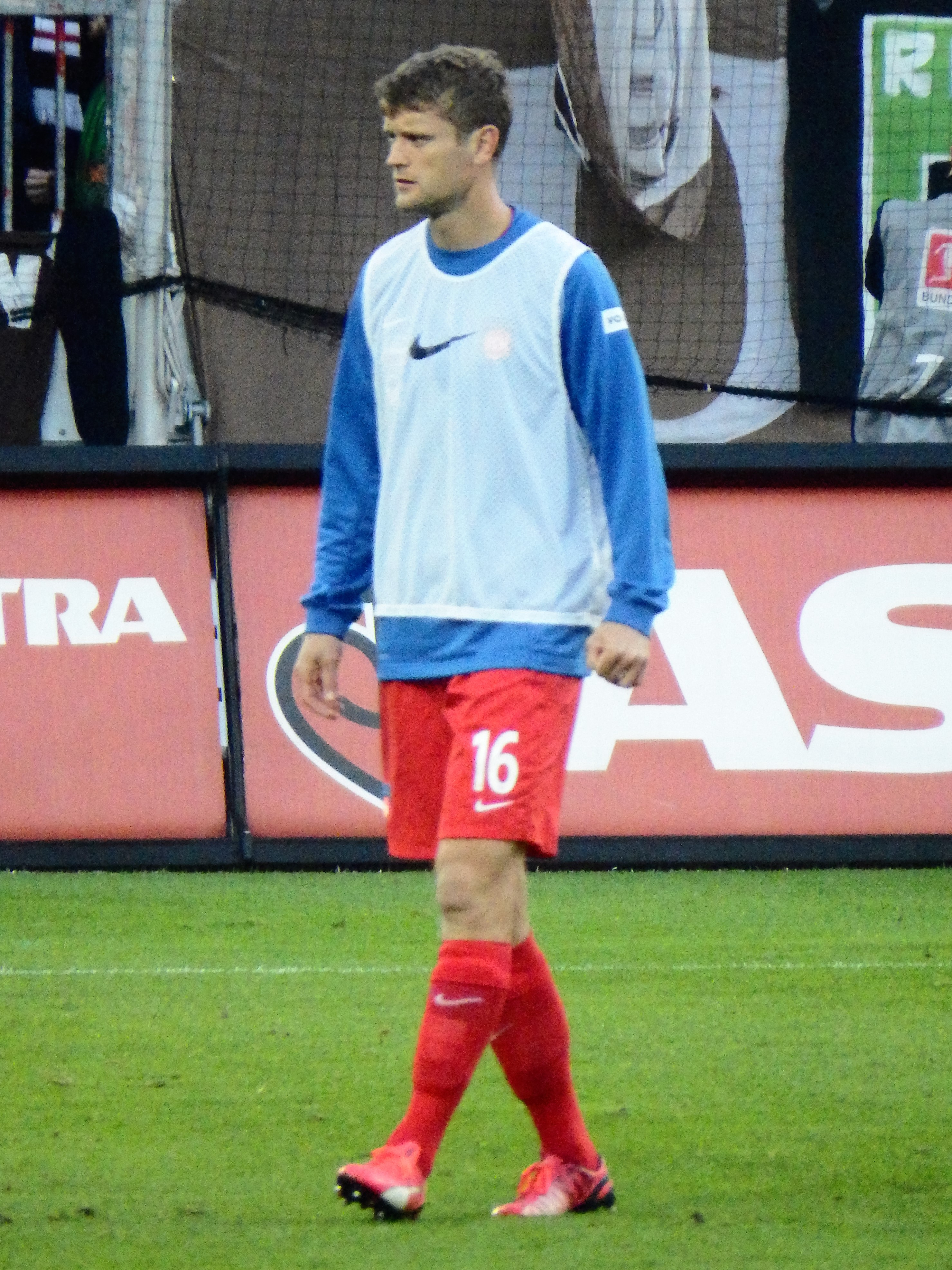 Göhlert, Tim Heidenheim